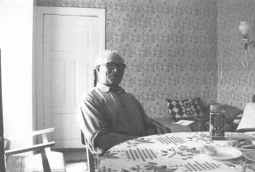 Estlandssvensken Oskar Friberg på Ormsö i Estlands skärgård, sensommaren 1993.